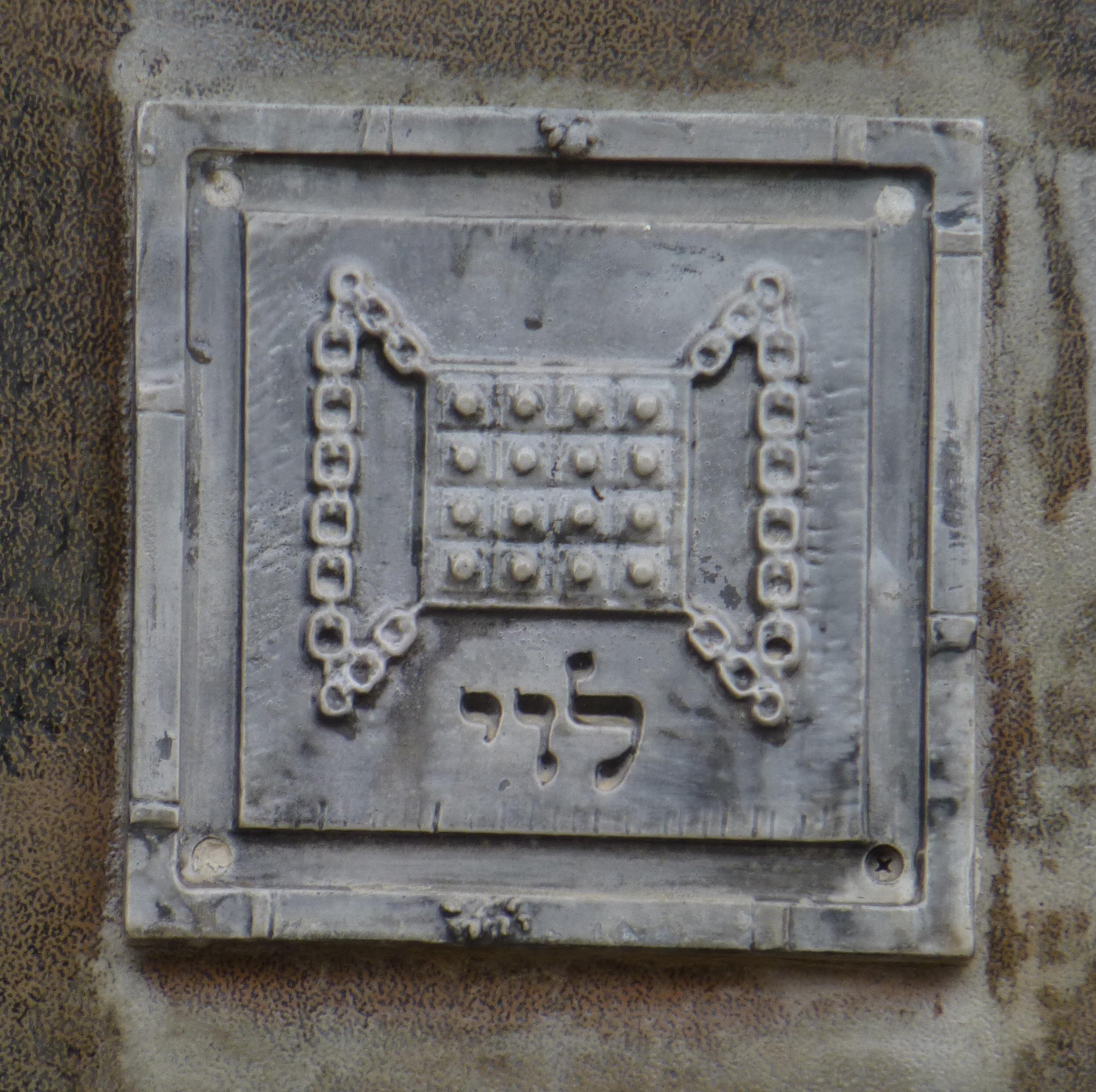 בית הכנסת הגדול "אוהל שרה" - בית הכנסת הראשון של רחובות, נבנה בשנת תרס"ד? ובהמשך שופץ והורחב והיה למוקד הקהילתי והחברתי של המושבה הצעירה.